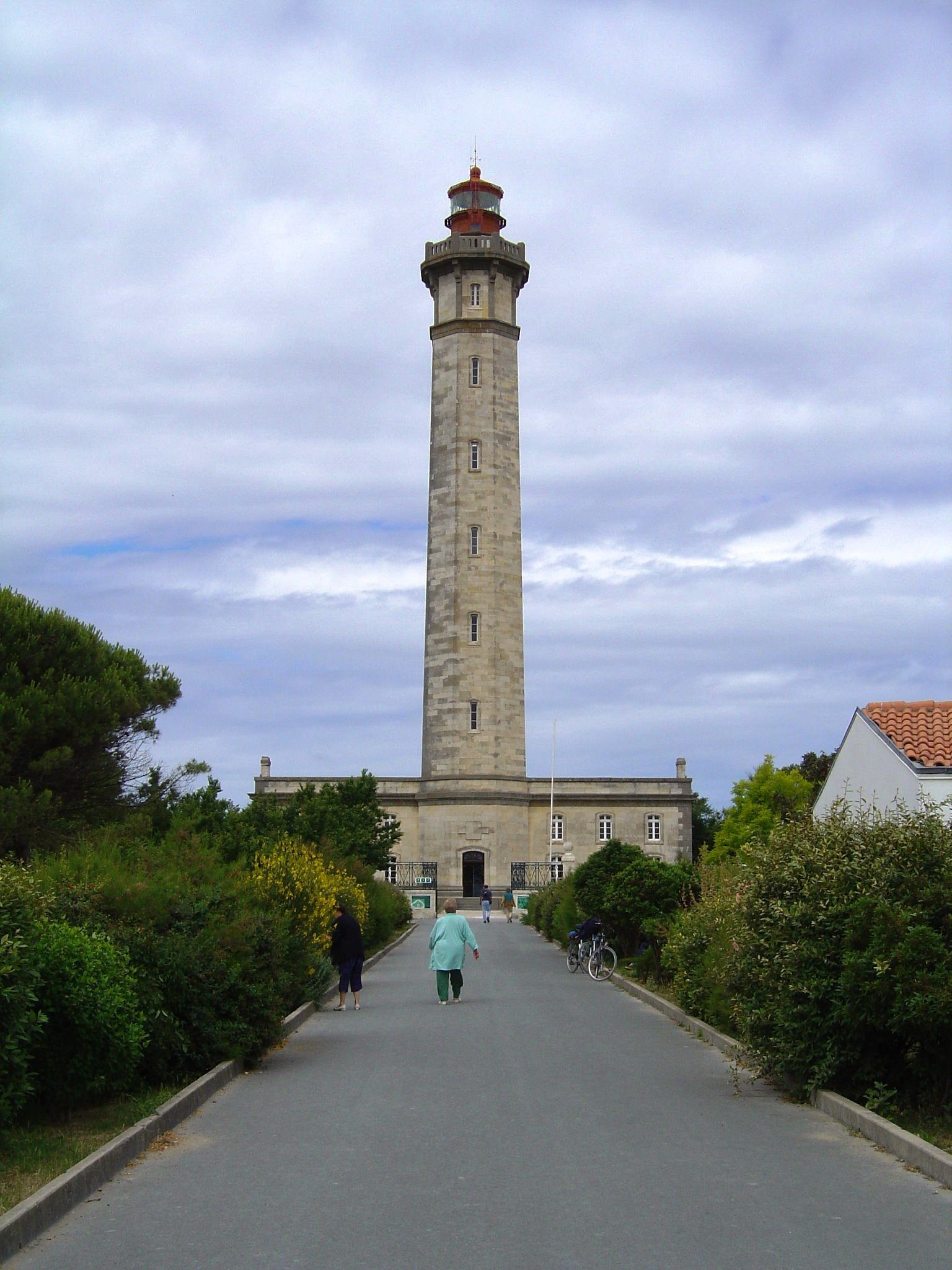 Île de Ré, Leuchtturm der Wale (Phare des Baleines) vom Dorf aus fotografiert am 19. Juni 2004 von User:Ile-de-re